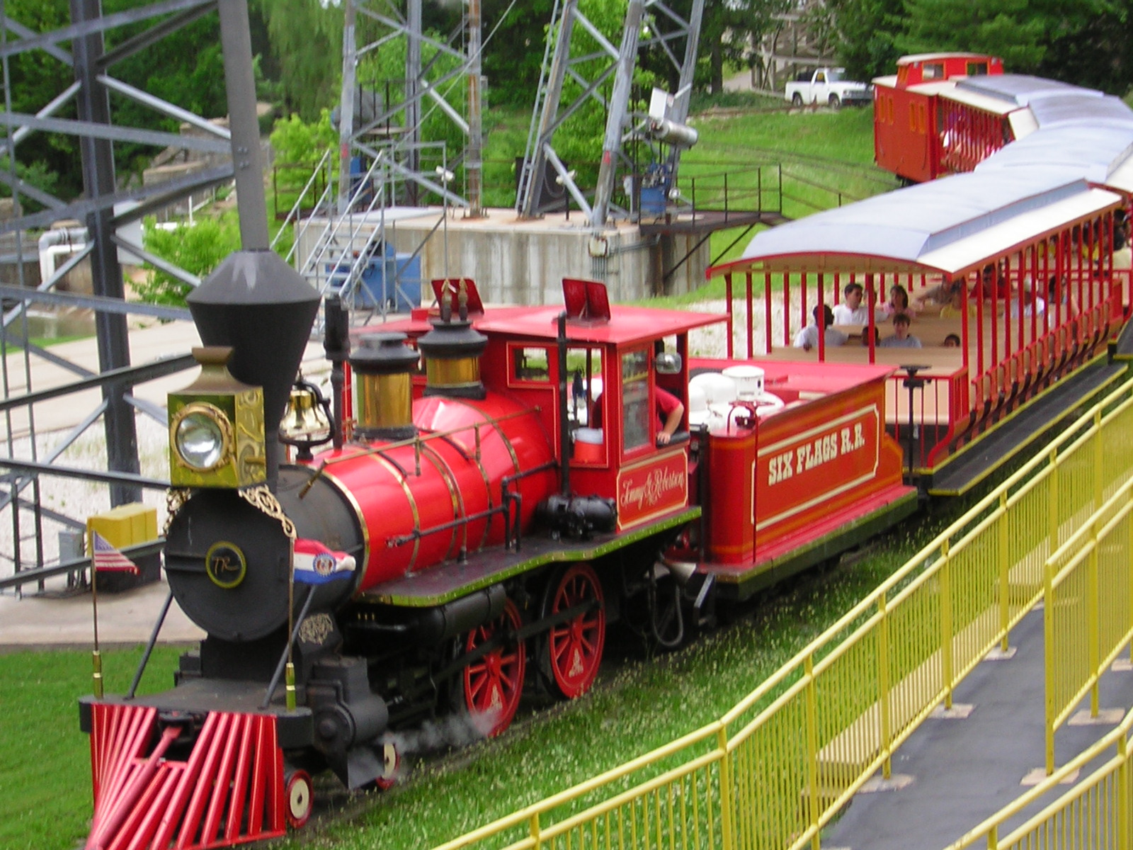 Park in St. Louis.